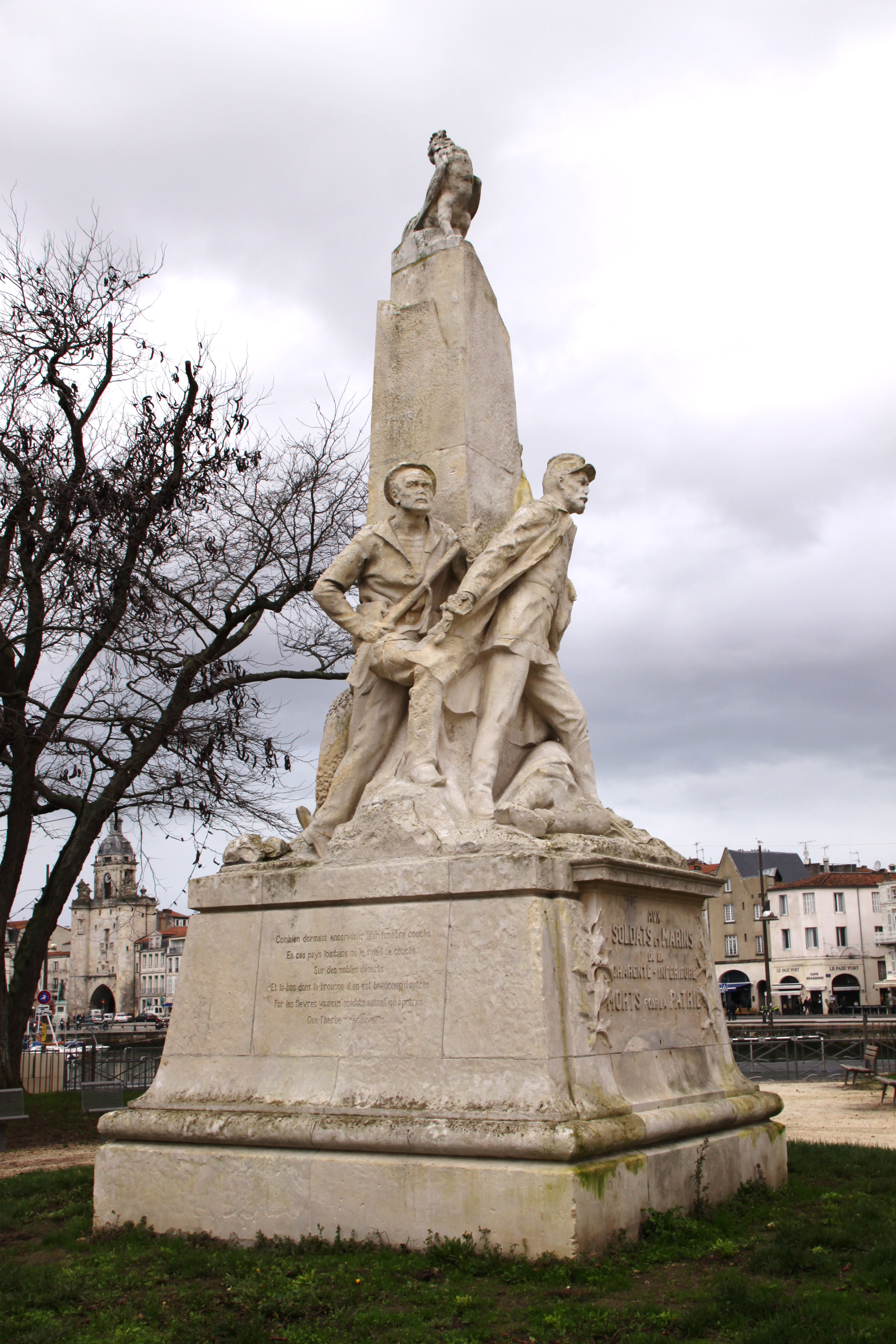 Le Mémorial des soldats et marins de la Charente-Inférieure, angle côté gauche et face avant. Ce monument commémoratif a été édifié en 1913 par le Souvenir Français (association patriotique) et la Ville de La Rochelle. Il est dédié à la mémoire des militaires de la Charente-Inférieure morts hors du territoire français. Le département de la "Charente-Inférieure" est devenu "Charente Maritime" depuis août 1941. La Rochelle (Square Valin), Charente Maritime, France.